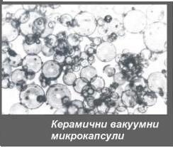 керамични микрокапсули